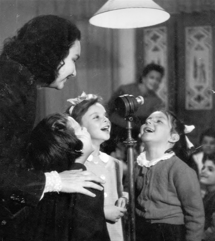 בלה ברעם ב"פינת הילד"